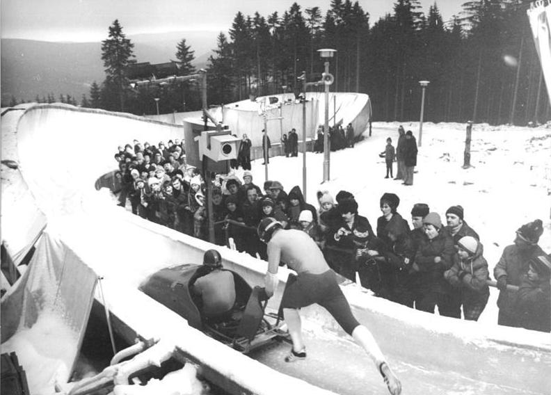 Bernhard Lehmann, Matthias Trübner ADN-ZB Schaar 28.1.77 Oberhof: DDR-Meisterschaften im Zweierbob-Bernhard Lehmann Matthias Trübner am Start zum zweiten von vier Wertungsläufen auf der Oberhofer Kunsteisbahn. Mit einer Gesamtzeit von 3:10,77 min für die vier Läufe erreichten sie den zweiten Platz. Erstmals konnten die vielen Hundert Besucher alle Läufe an einem Tag erleben.